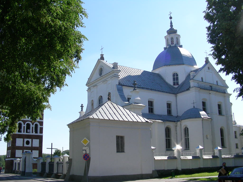 Беларуская (тарашкевіца): Комплекс былога кляштара езуітаў:касьцёл Божага Цела з дэкаратыўным аздабленьнем:росьпісы ў інтэр’еры, выкананыя пад кіраўніцтвам К. Д. Гескага; алтарная карціна «Тайная вячэра» К. Д. Гескага;надмагільныя помнікі і барэльефы: Мікалая Крыштапа Радзівіла Сіроткі, Канстантына Радзівіла, Эльжбеты Яўфіміі Радзівіл, Крыштапа Радзівіла, Ігната Мураўскага, Канстанцыі Радзівіл, Людвіка Кандратовіча (У. Сыракомля);скульптуры на галоўным фасадзе:Сьв. Крыштапа, Сьв. Мікалая, Сьв. Францішка Ксаверыя, Ігнація Лаёлы;пахавальная крыпта роду Радзівілаў (70 трун-саркафагаў, канопа і урна з прахам);вежа;капліца Булгарына;агароджа з брамай. г. Нясьвіж This is a photo of Belarusian heritage monument. Reference number: 610Г000465 ( WLM)